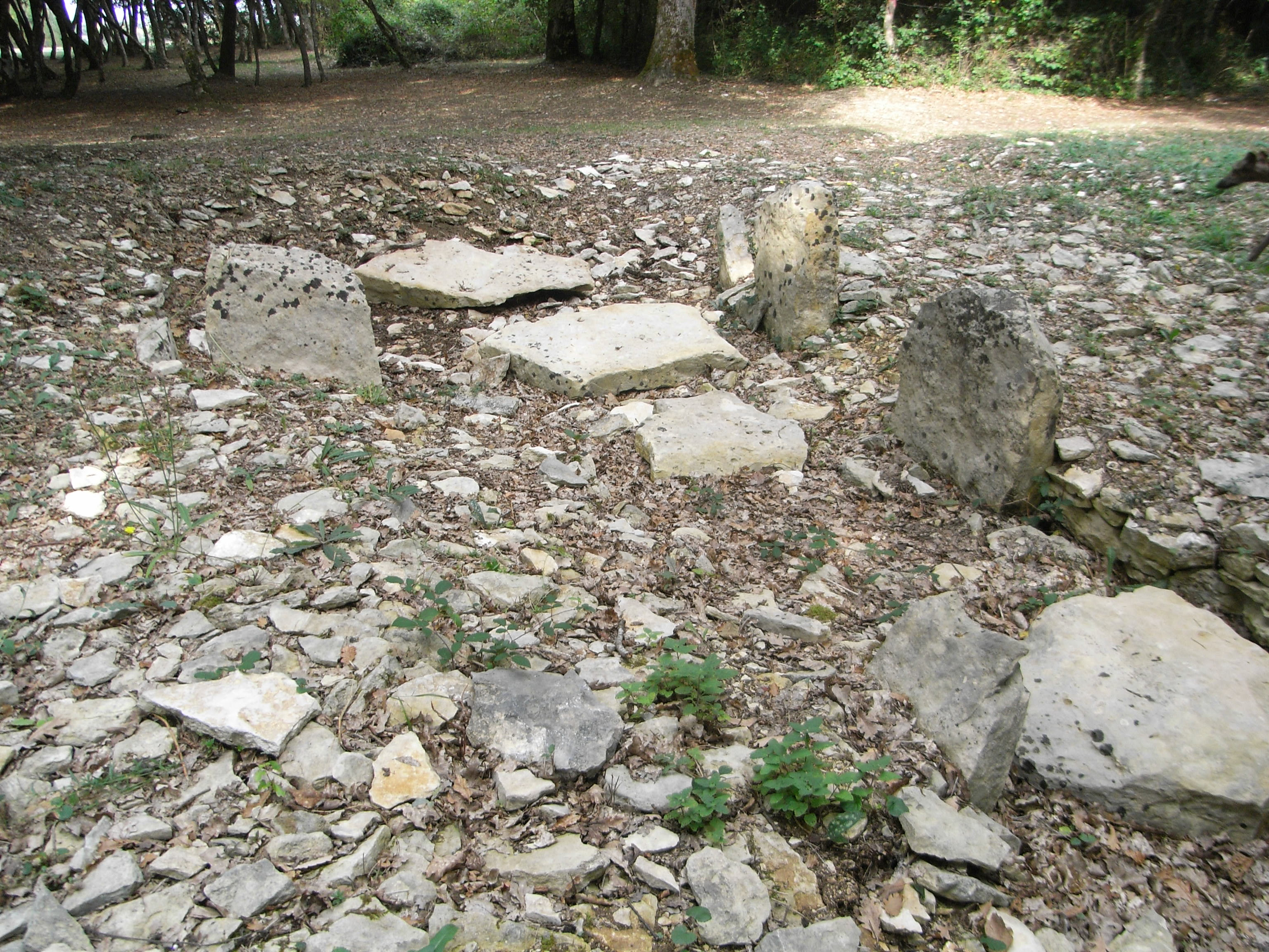 Tumulus de Champ Châlons (forêt de Benon) à Benon en Charente-Maritime (France).